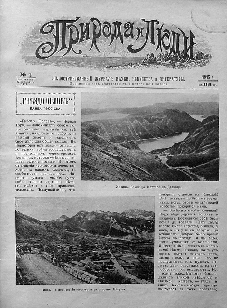 Титульный лист журнала "Природа и люди" со статьей П.А .Россиева "Гнездо орлов"